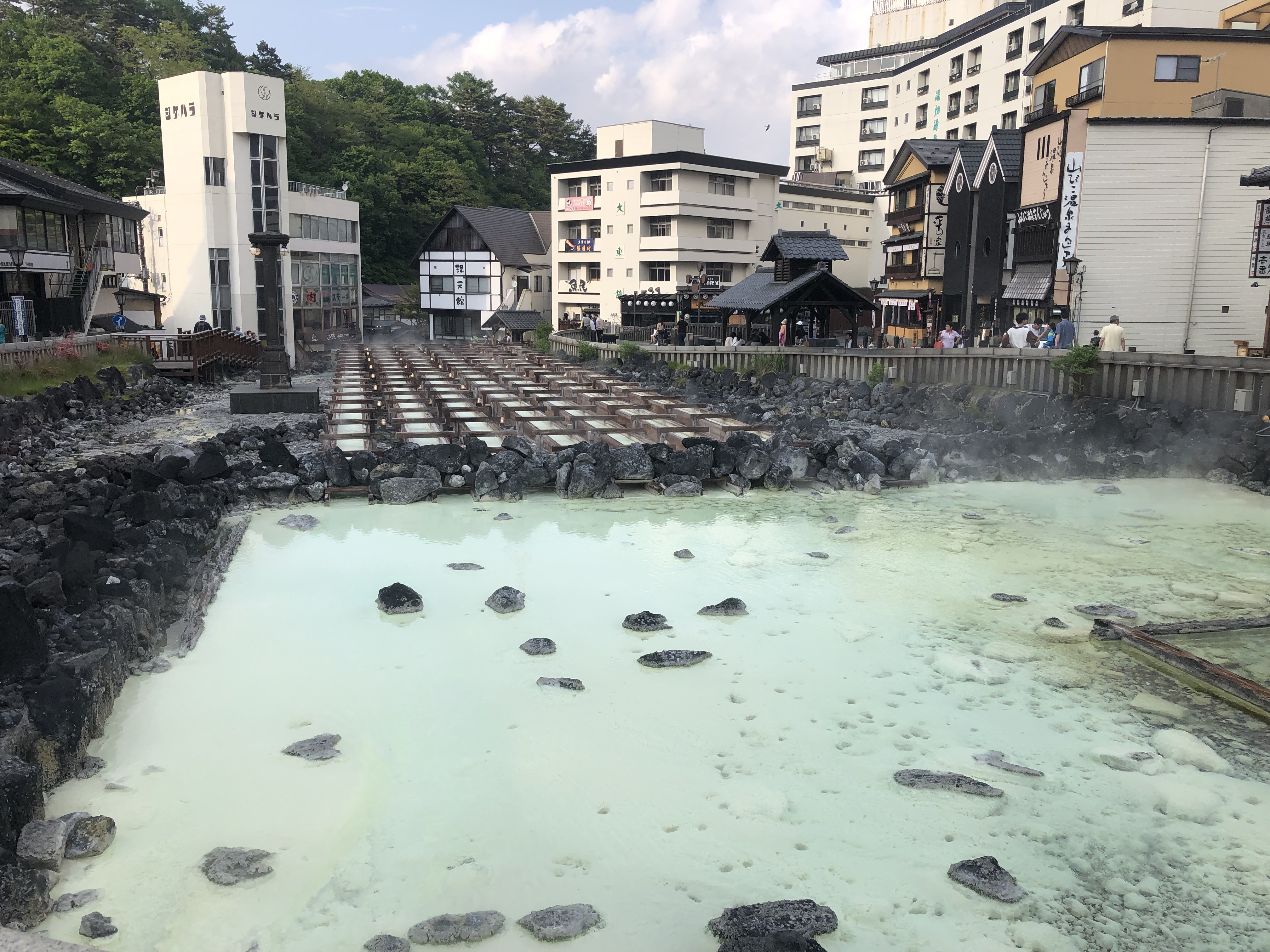 草津温泉 湯畑